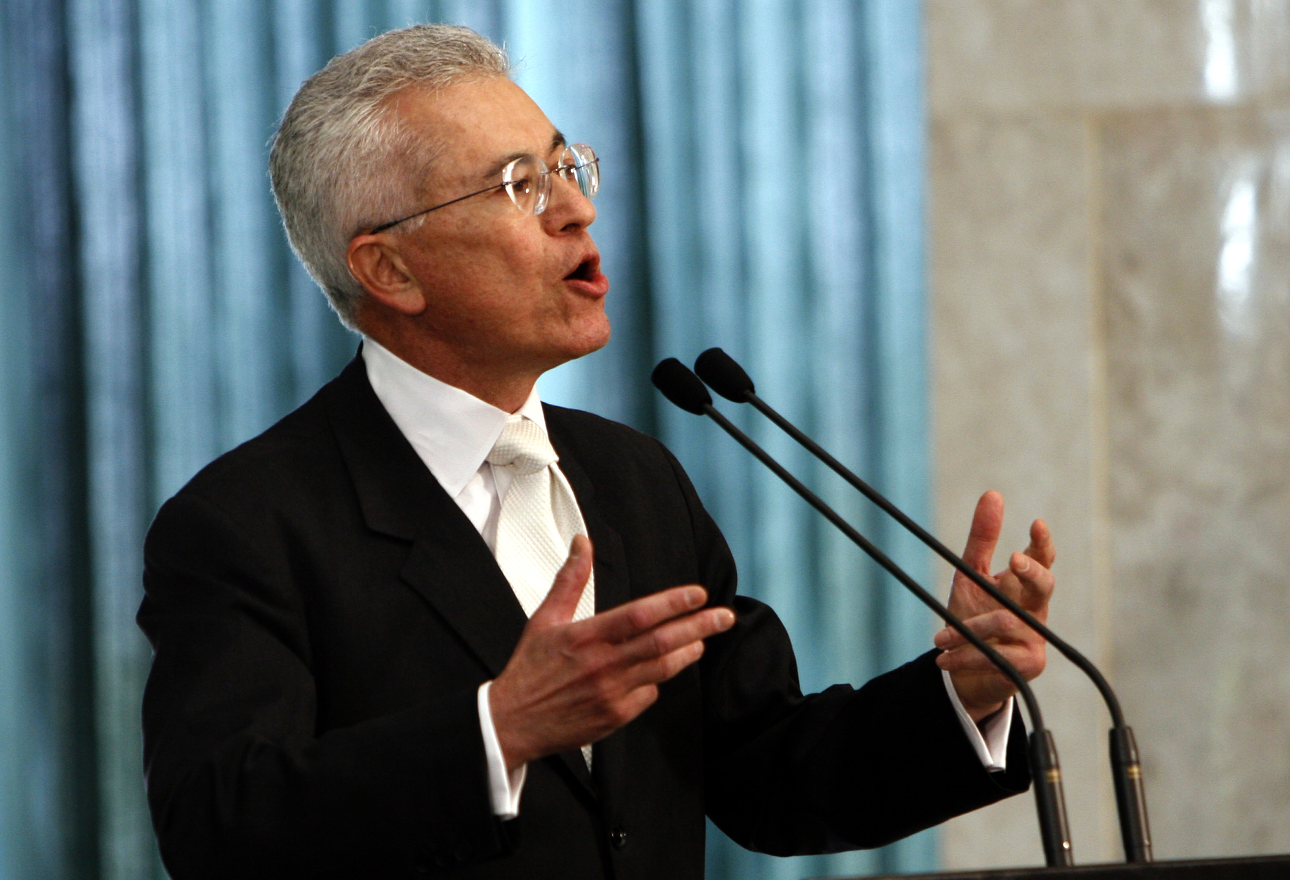 O cientista social brasileiro Roberto Mangabeira Unger.